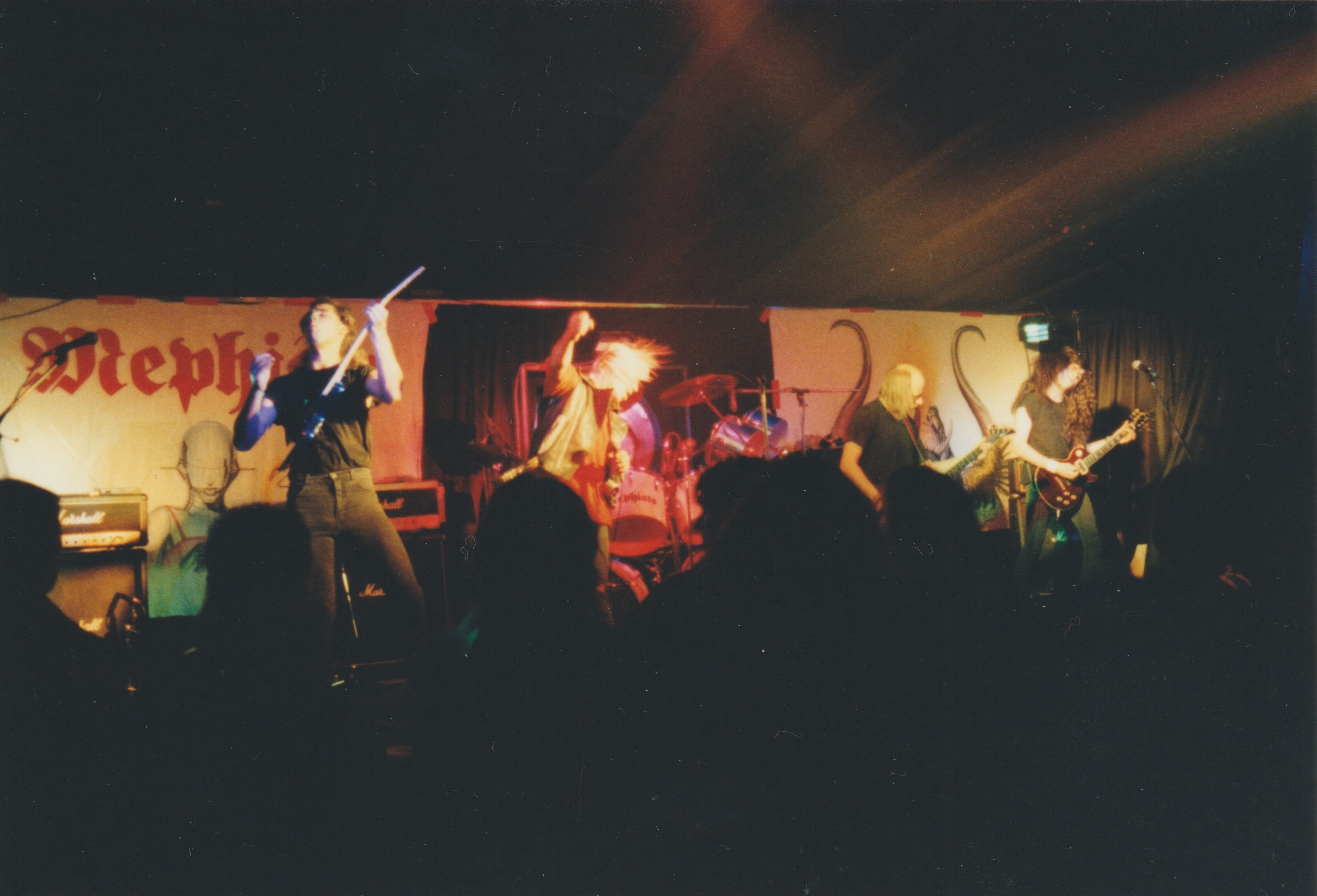 Mephisto live on stage in the end of 1993 at "Discothek Spektrum" in Castrop-Rauxel, Germany"